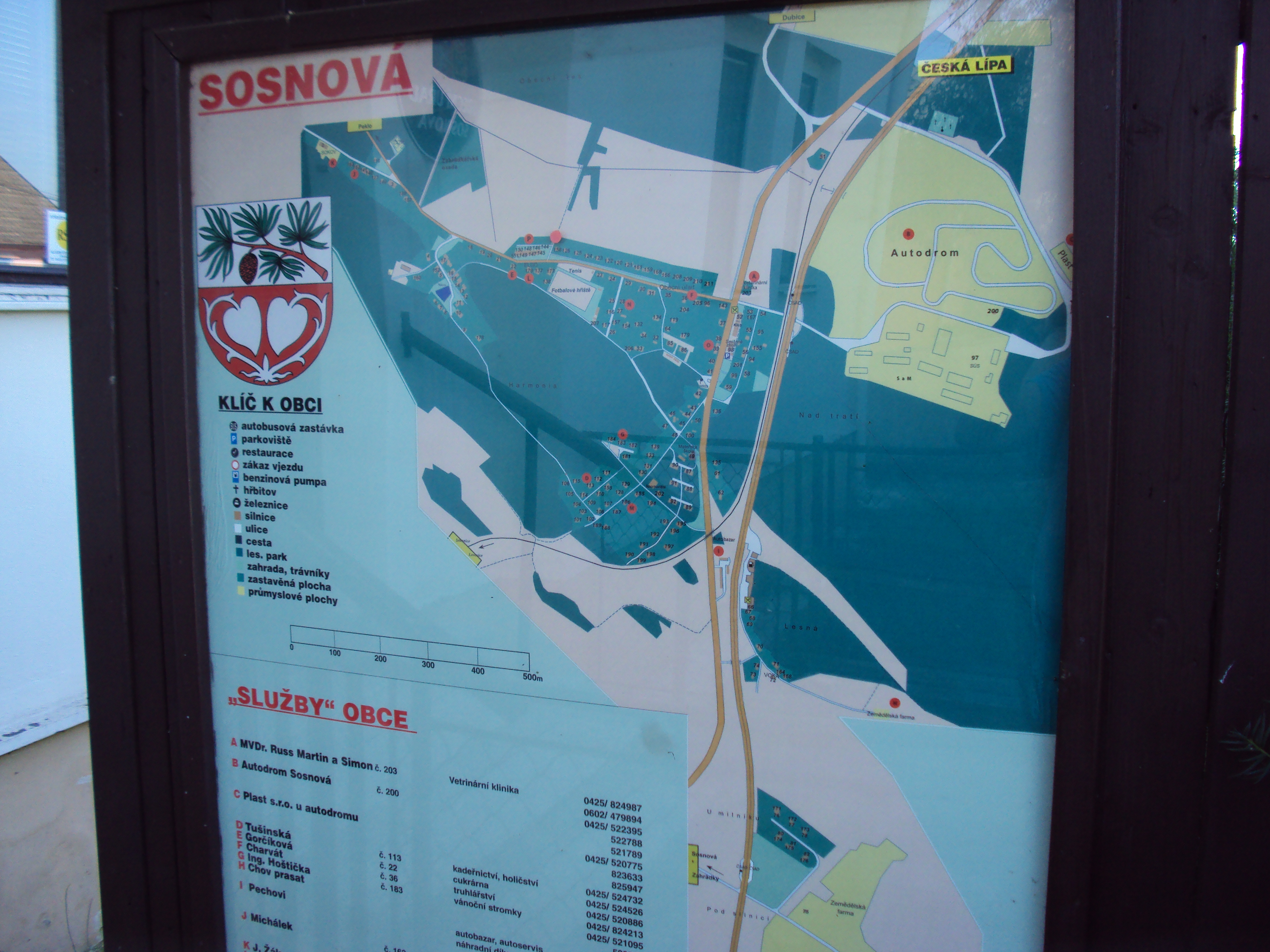 Plánek obce Sosnová u České Lípy je na více místech v obci